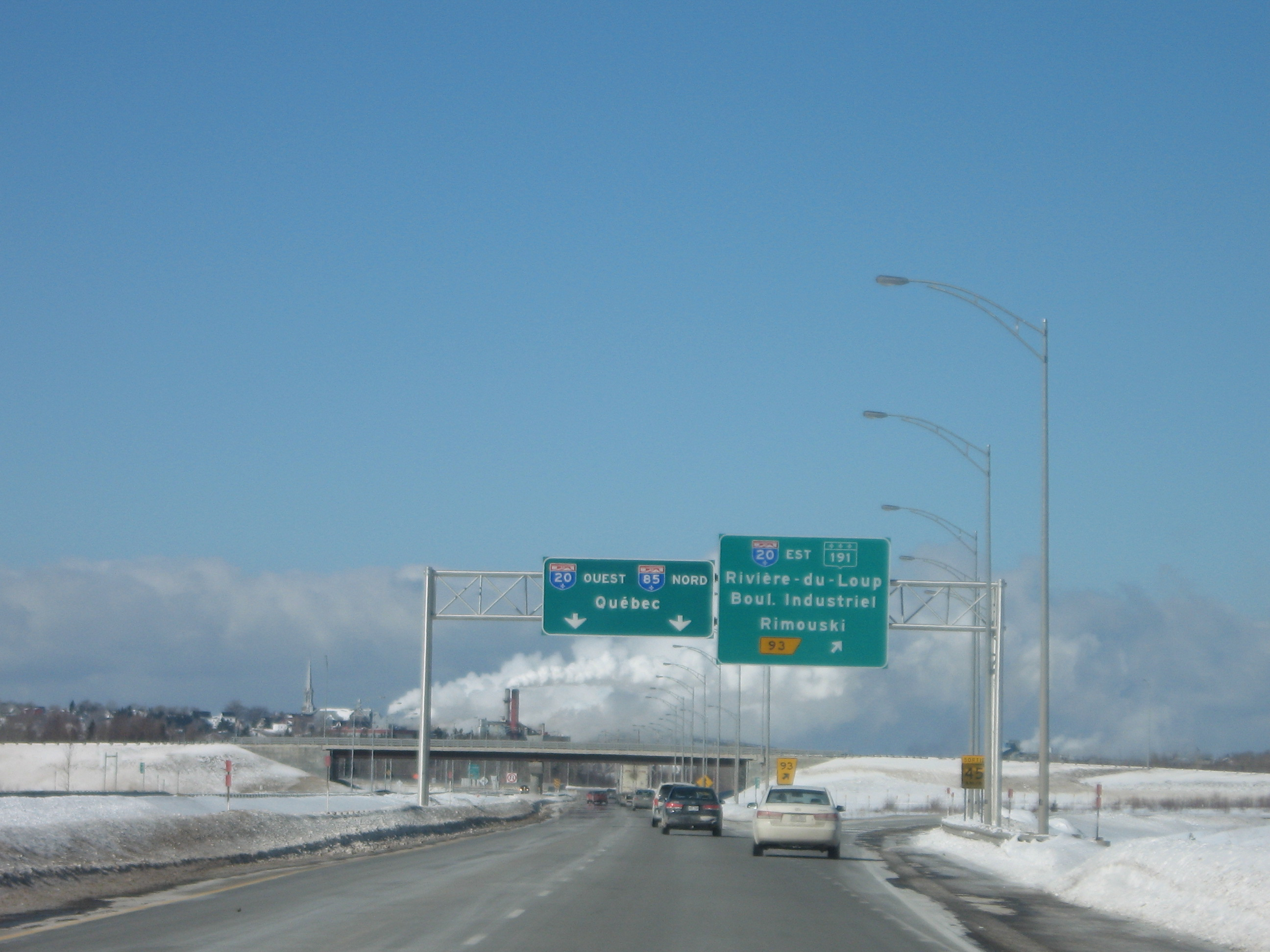 autoroute 85